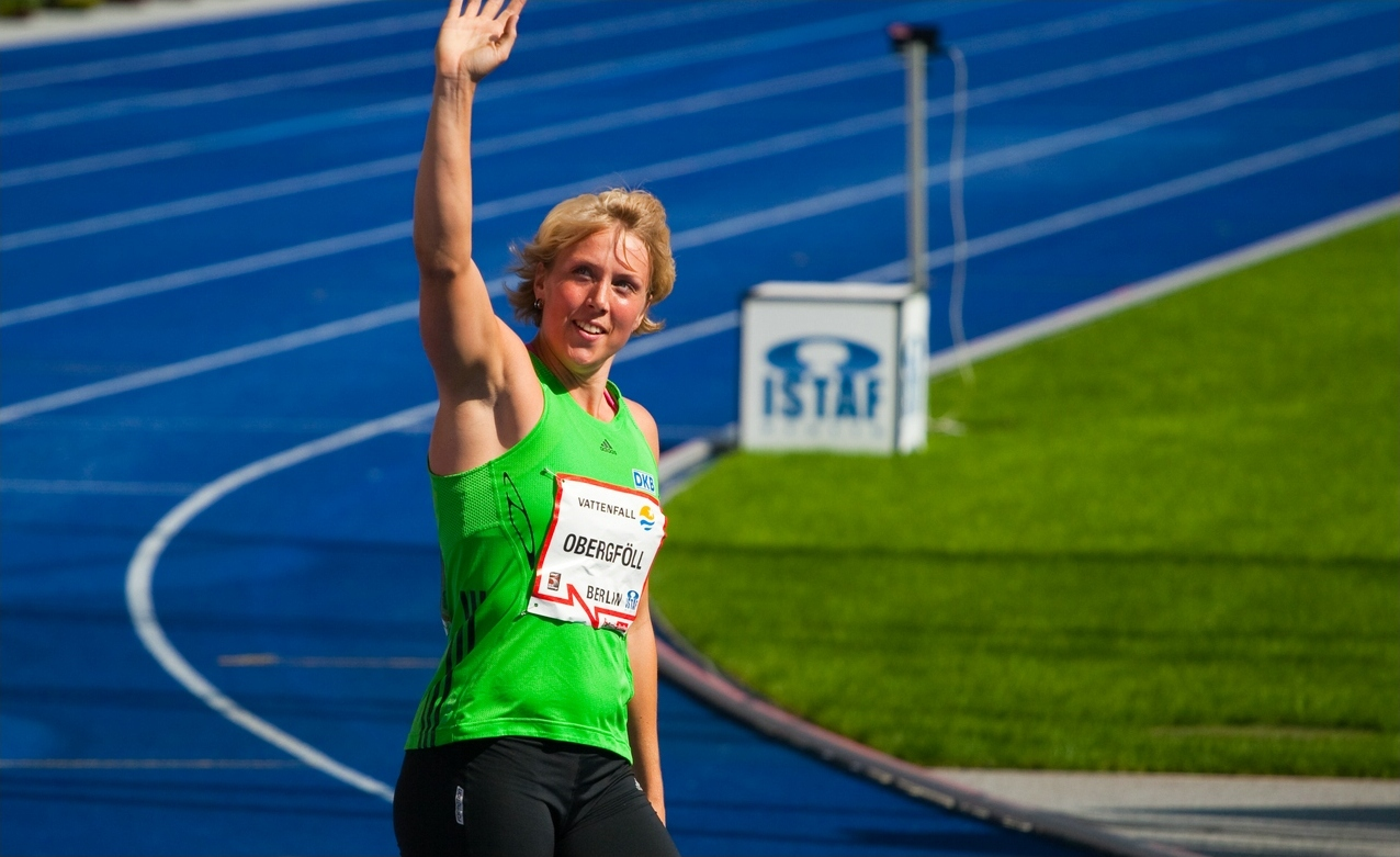 Christina Obergföll, Speerwerfen